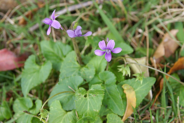 リュウキュウコスミレ （沖縄県今帰仁村） Viola yedoensis var. pseudojaponica (Nakijin, Okinawa, JAPAN)